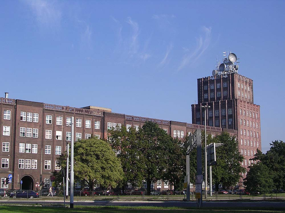 Budynek Poczty Na działce geodezyjnej Nr 3, AM-1, obręb Południe Krasińskiego 2, Miasto Wrocław - Śródmieście